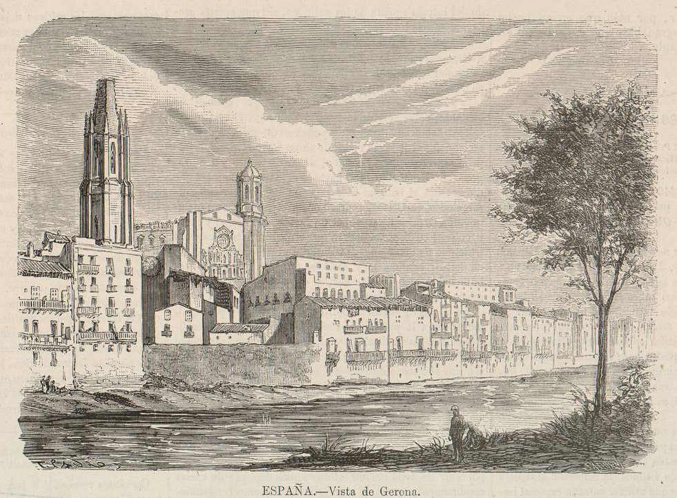 Vista de Gerona